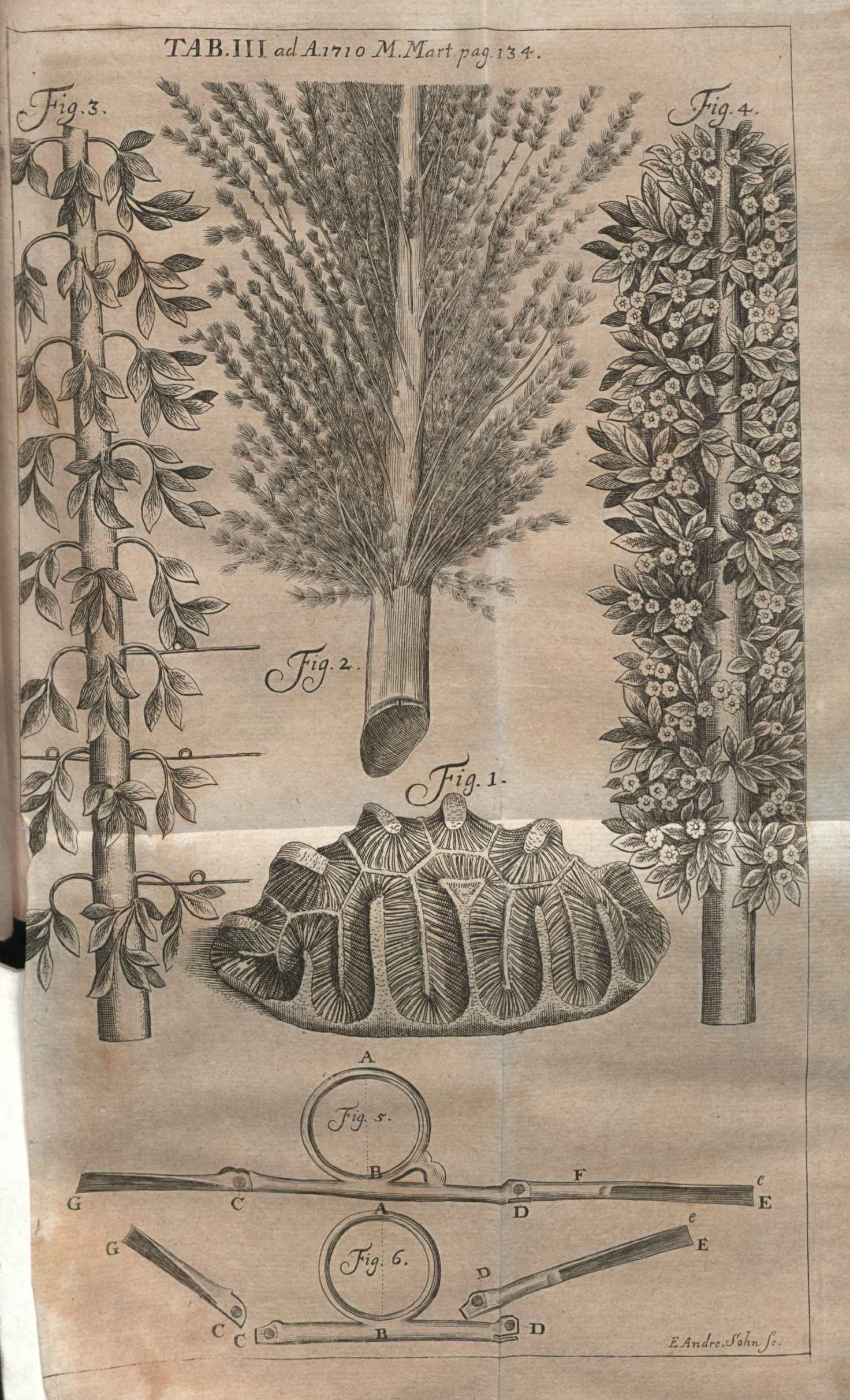 Illustration